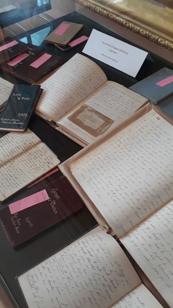 Ensemble de cahiers manuscrits rédigés pendant la première guerre mondiale par Eugénie Deruelle